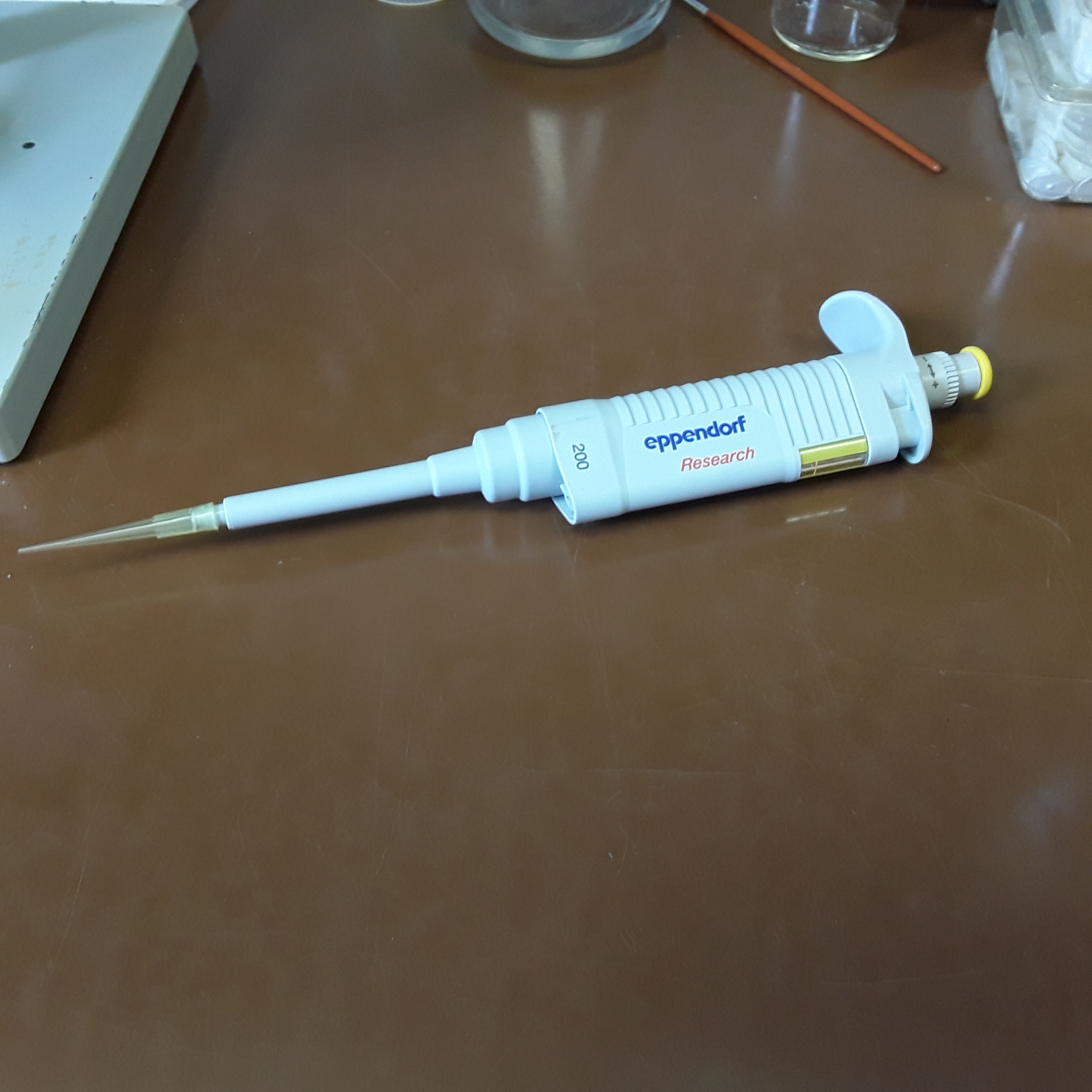 pipeta